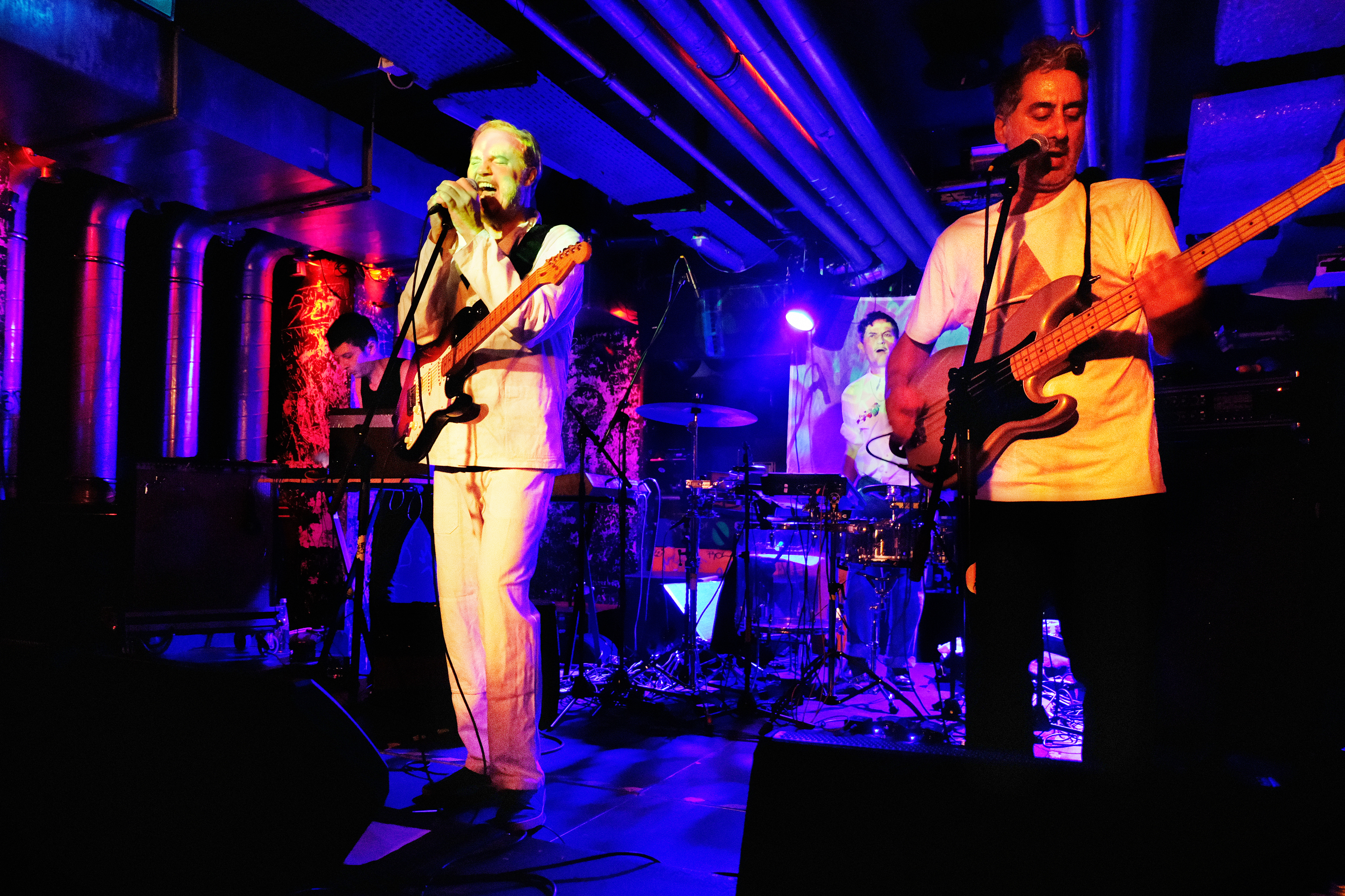 „Die Türen“ in der Roten Sonne in München (2019)